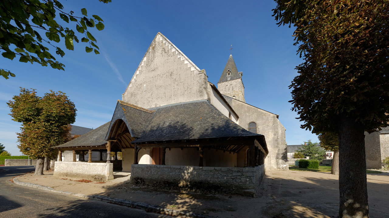 Église Notre-Dame de Mulsans .